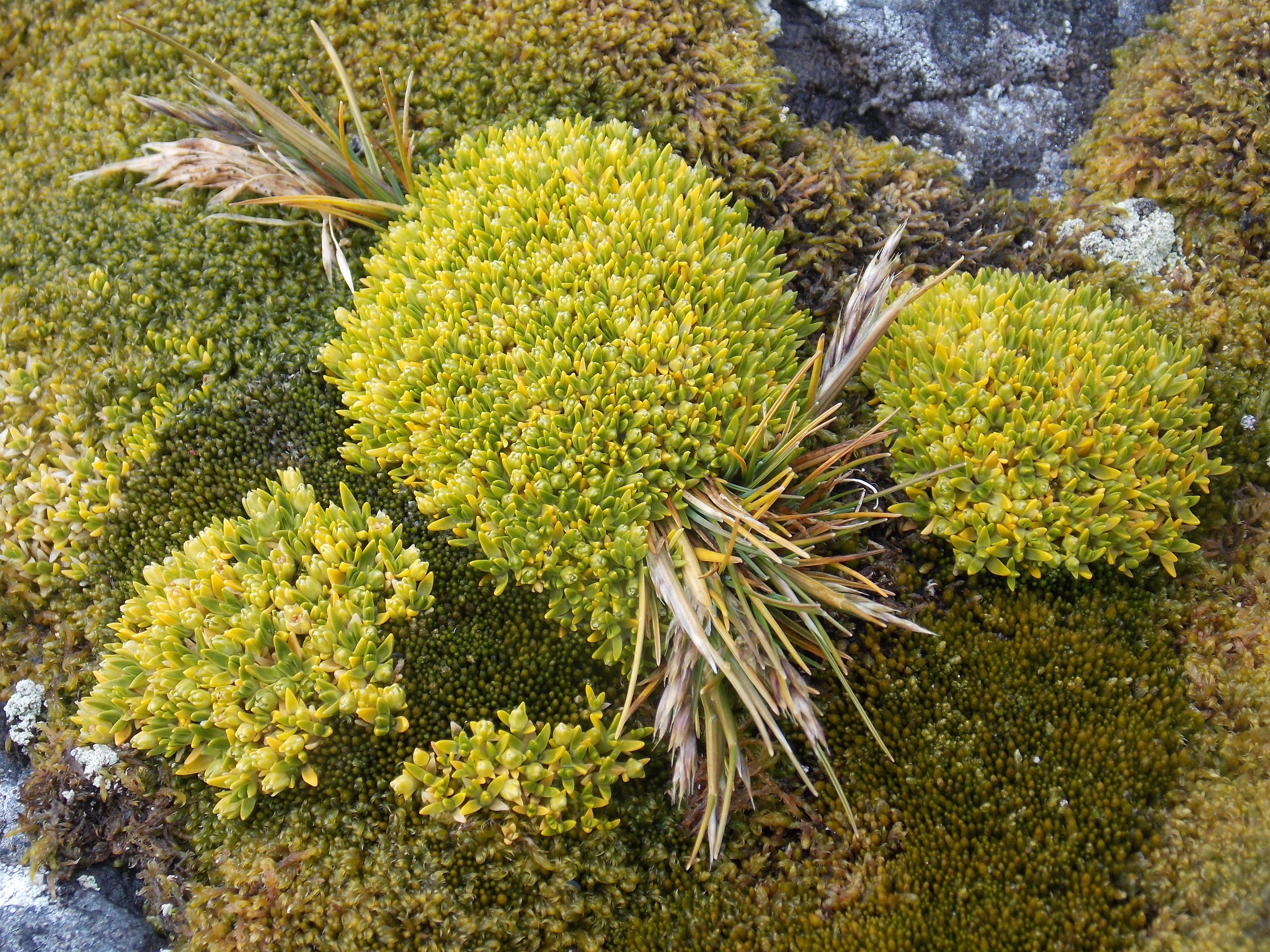 Перлинниця антарктична – південний родич звичайного мокрецю (Sagina) поширеного по всій Україні. Фото І. Парнікози. Район Аргентинських островів, 2014 р.